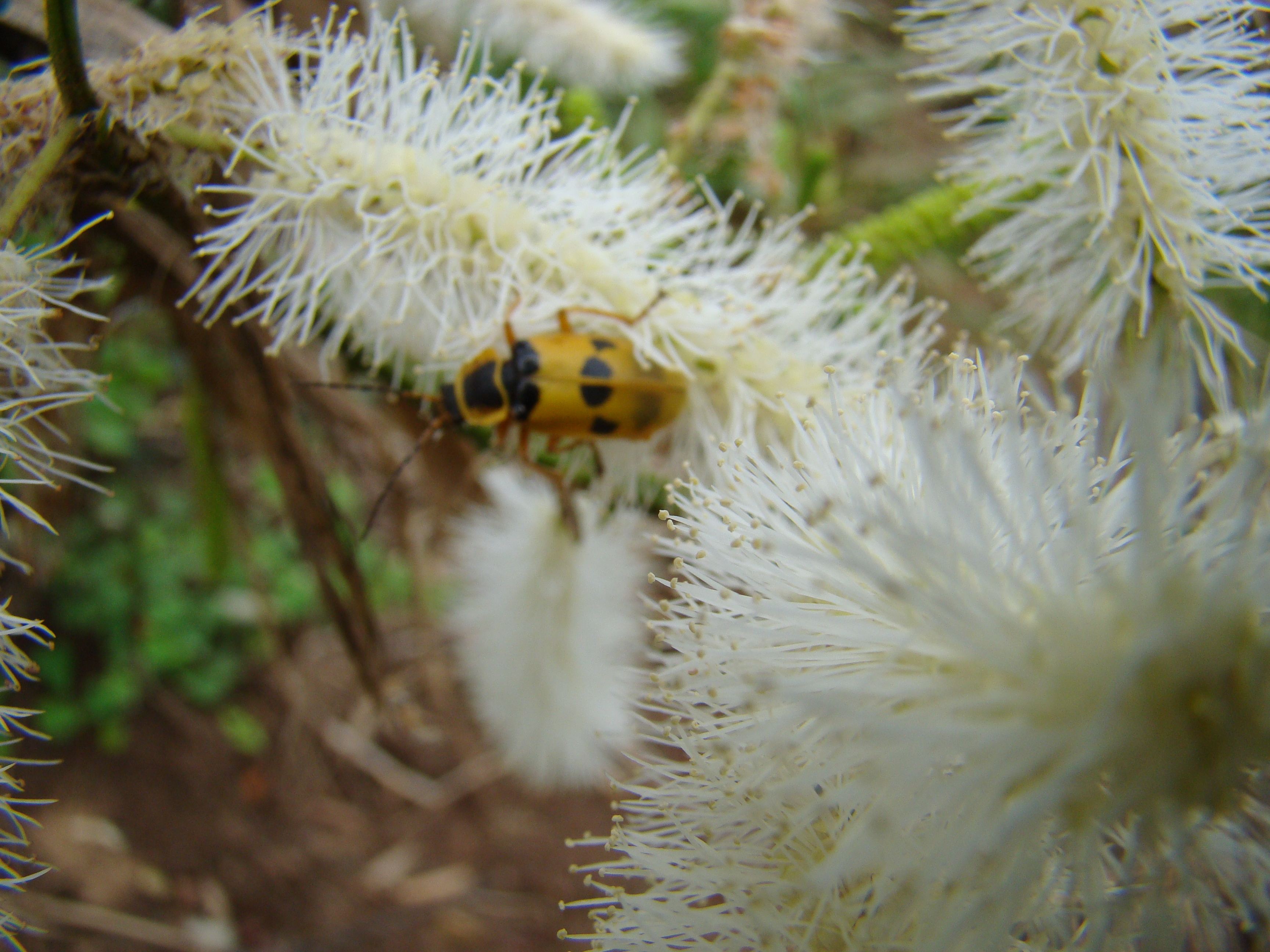 Mococa Brazil